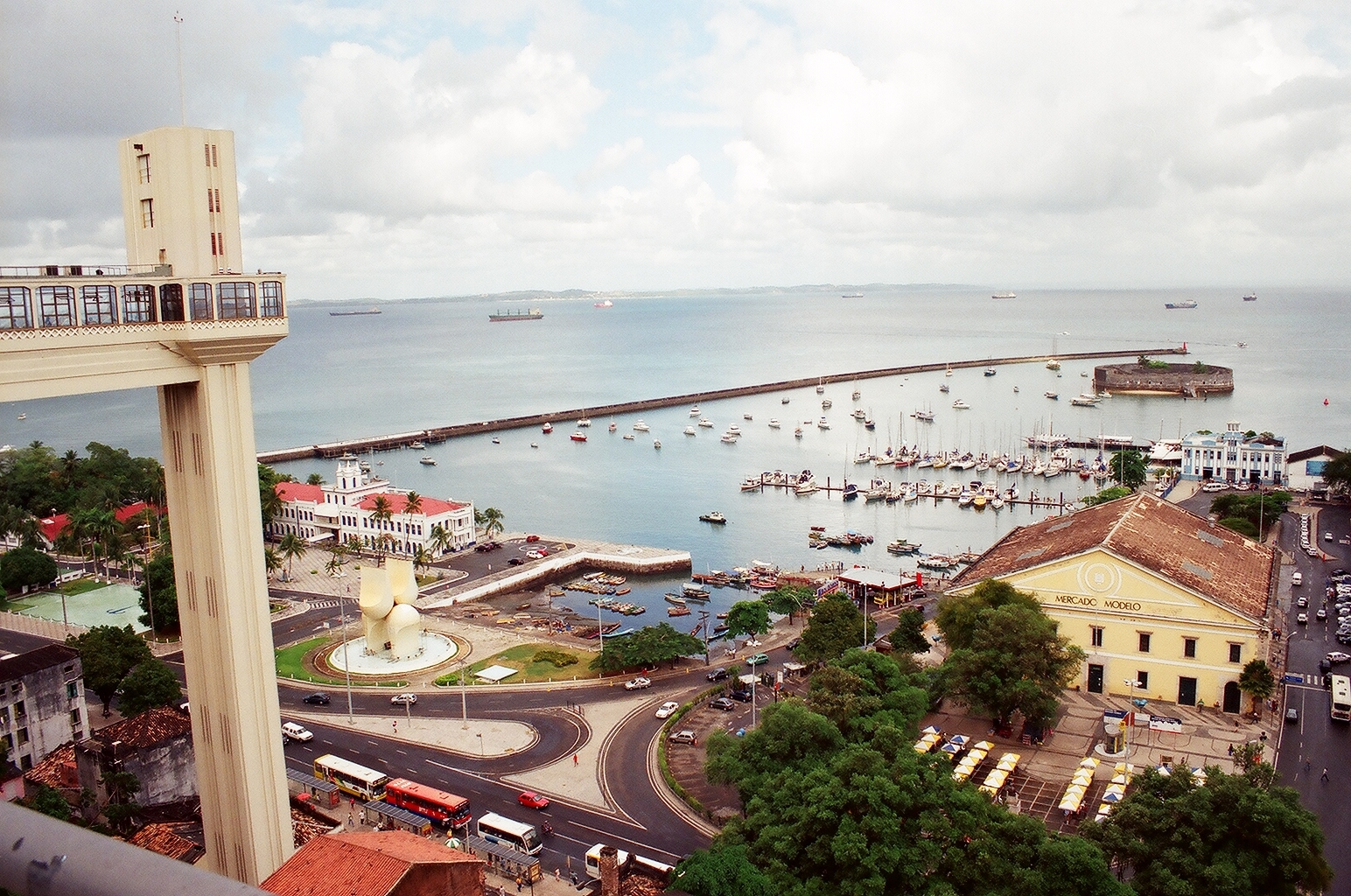 Elevador e Mercado Modelo - Salvador, Bahia